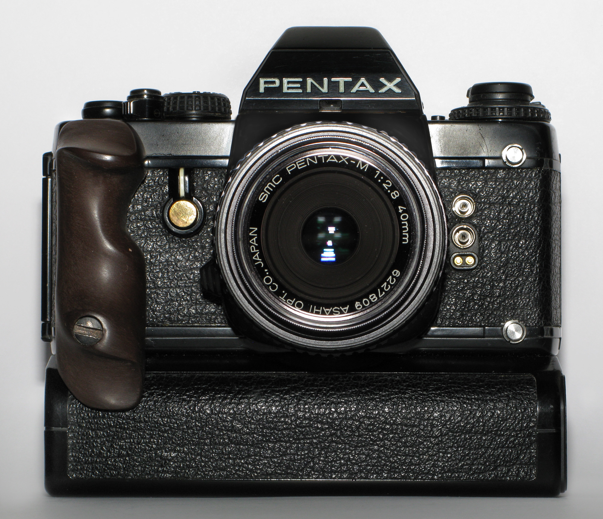 Pentax LX mit Winder LX und 2.8/40mm Objektiv